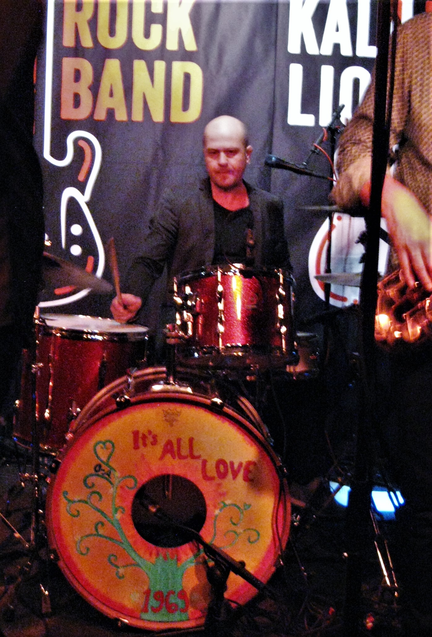 Okko Laru Ile Kallio Big Rock Bändin kanssa vuonna 2016.